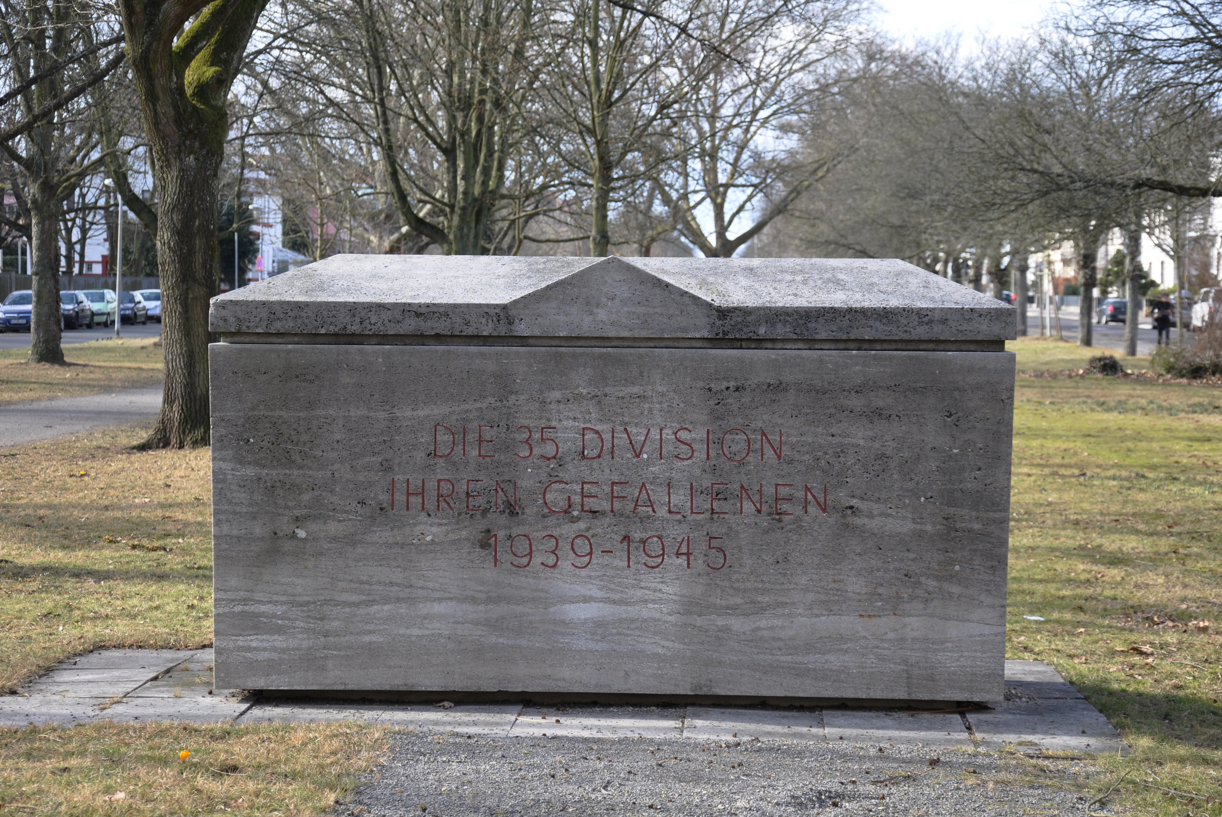 Karlsruhe, Gefallenendenkmal der 35. Division an der Hildapromenade (Höhe Haydnplatz)